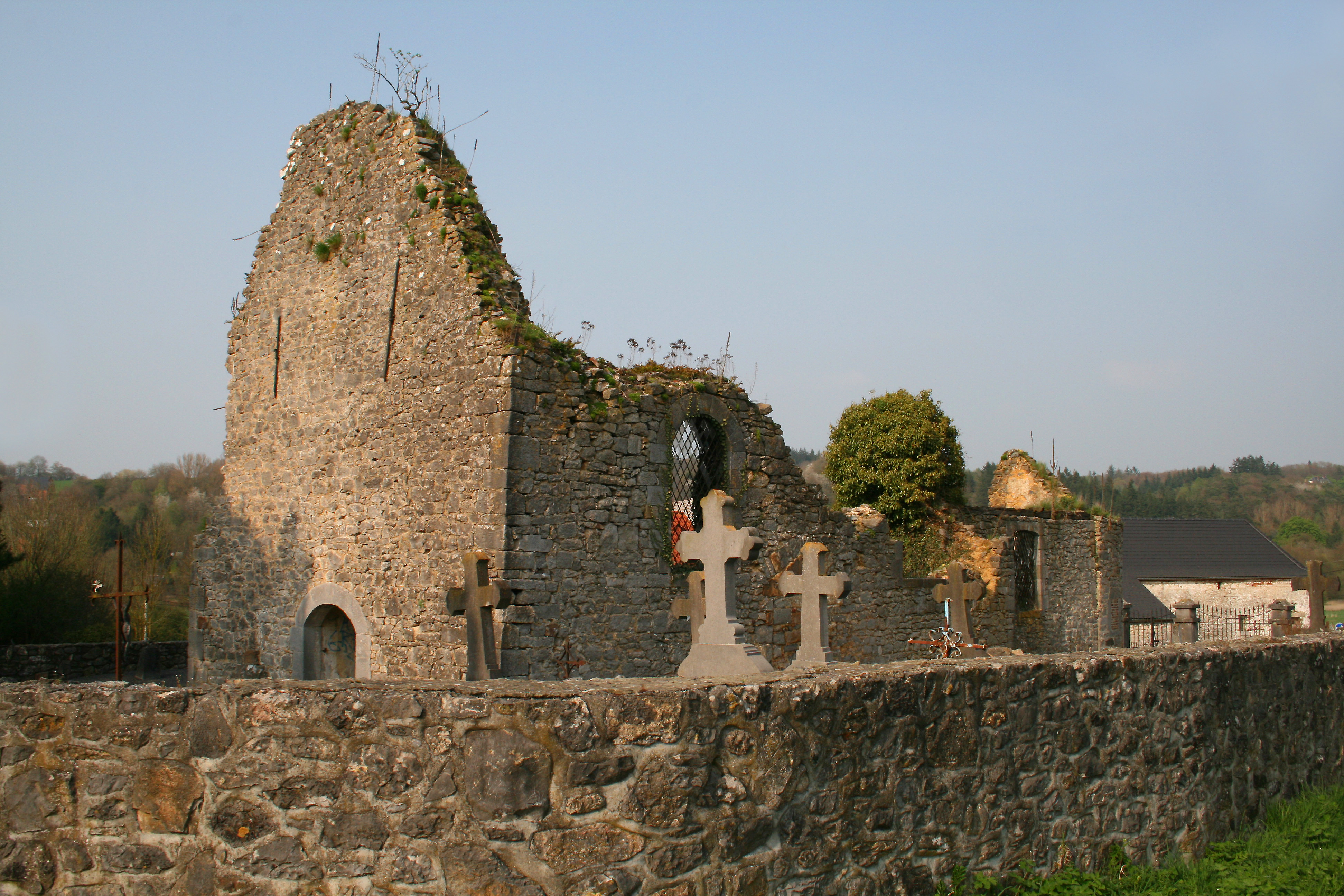 Leval-Chaudeville (Belgique), ruines de l'ancienne église Saint-Martin (XIe siècle) et son ancien cimetière emmuraillé. Avant d'être ravagée par la foudre le 27 juin 1967, cet édifice était considéré comme étant la plus vieille église de Belgique.